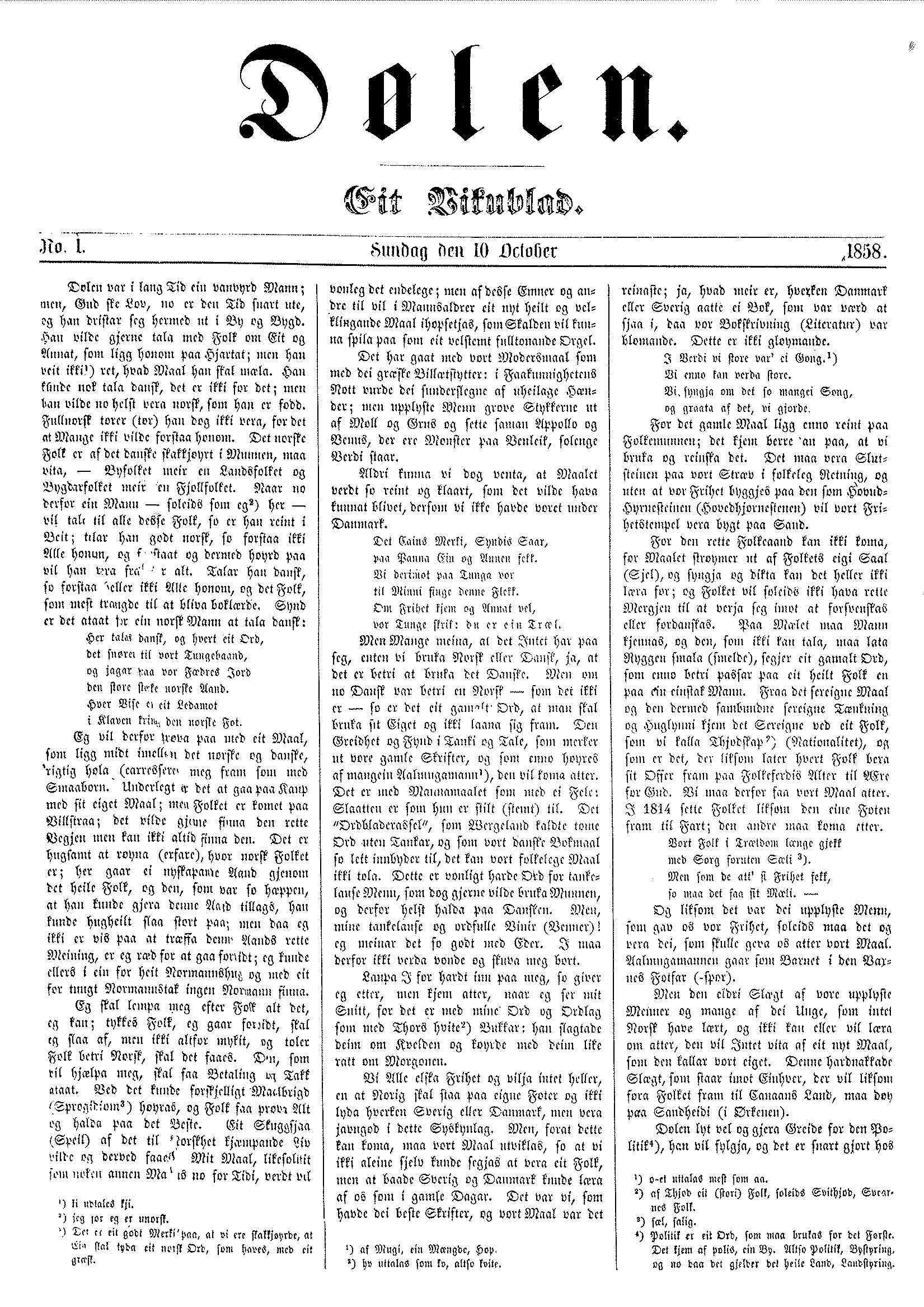 Første side av første utgåve av Dølen